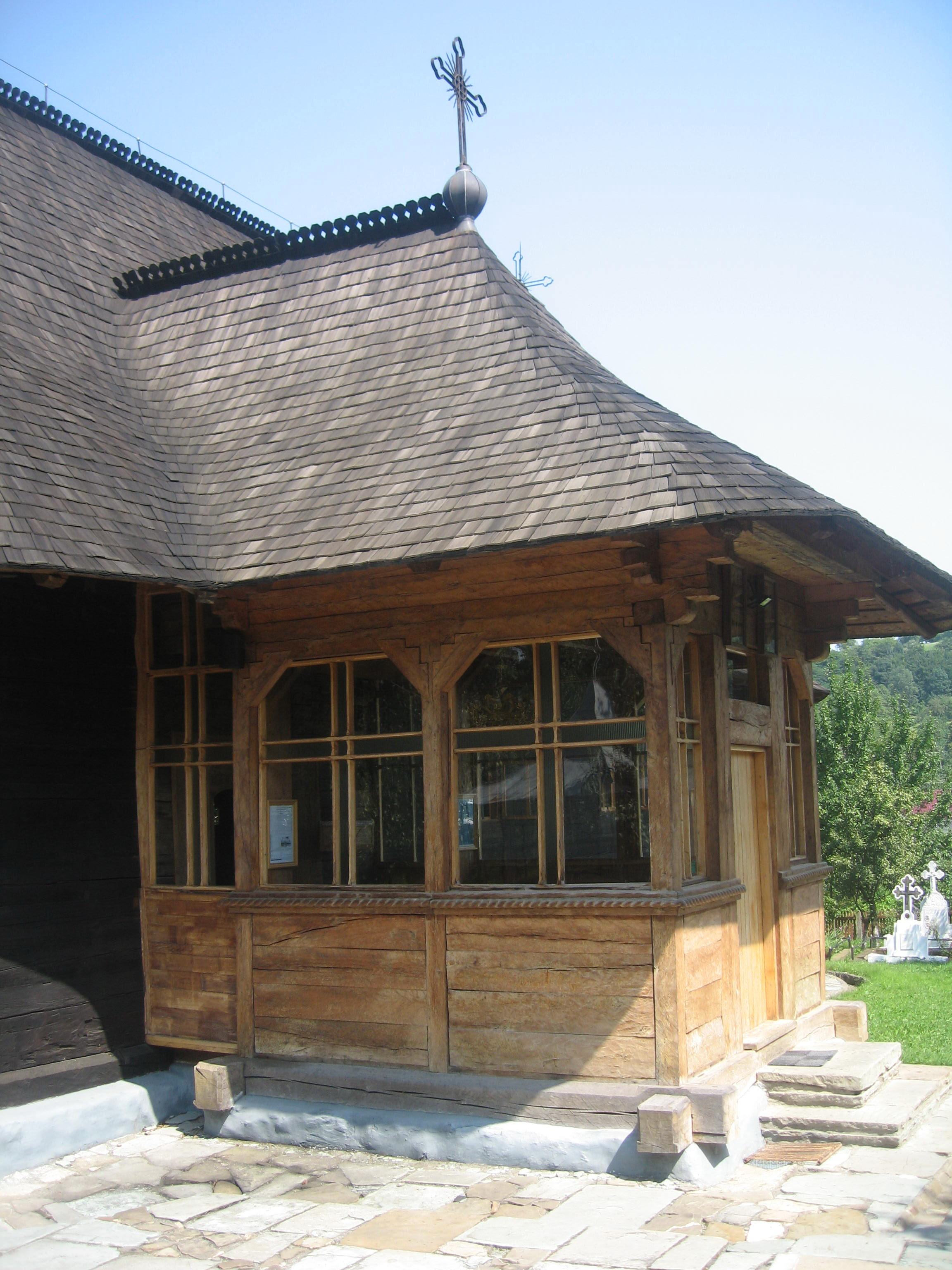 Biserica de lemn din Rădăşeni